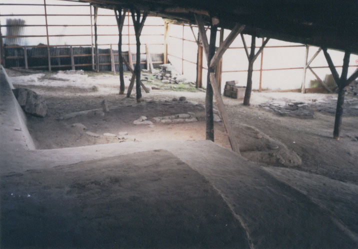 Изглед главног налазишта Лепенског Вира заштићеног старом конструкцијом.